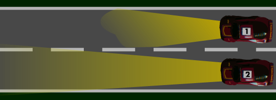 Auto 1 fährt mit Abblendlicht (Linksverkehr), Auto 2 mit Fernlicht